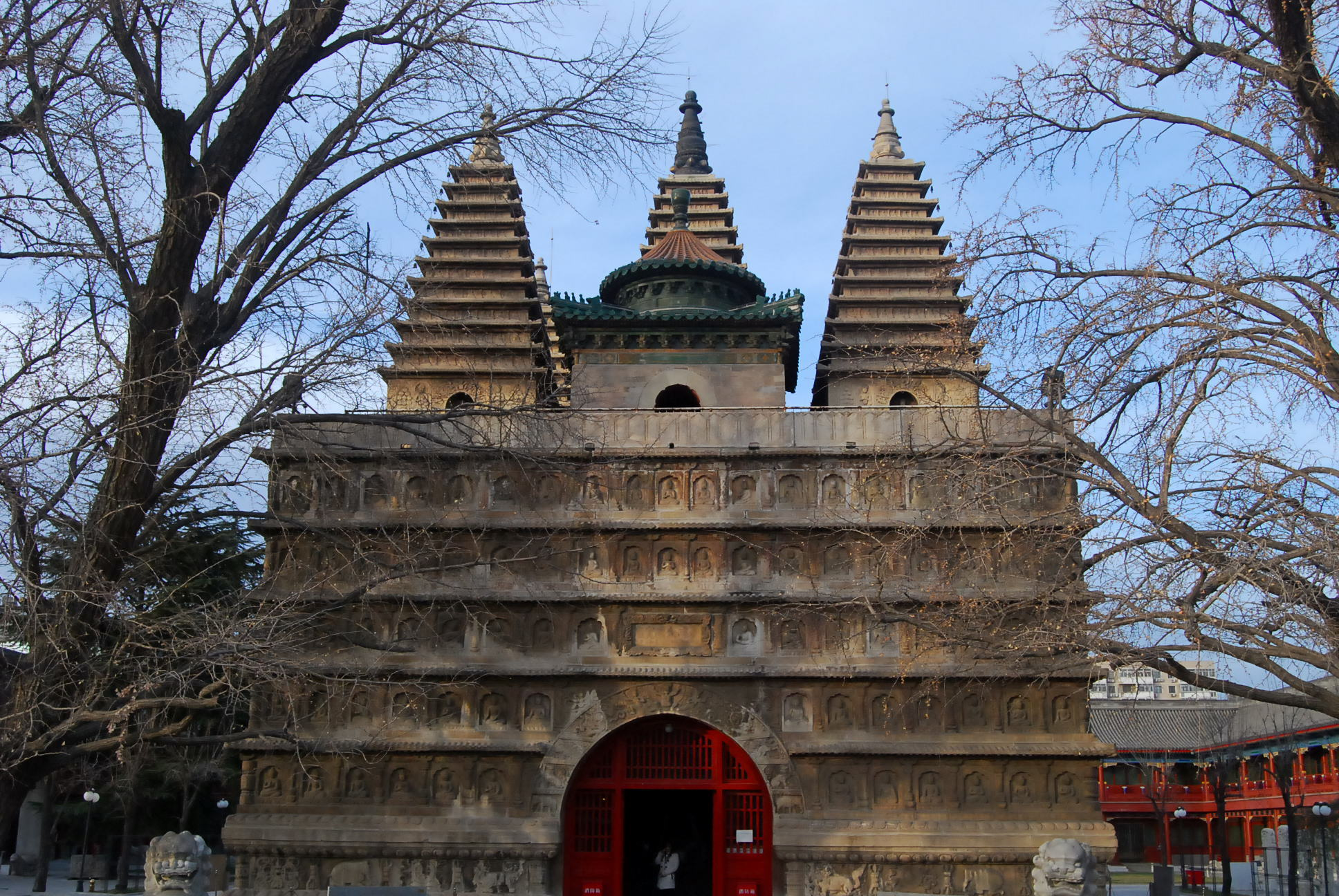 真觉寺的金刚宝座塔正面